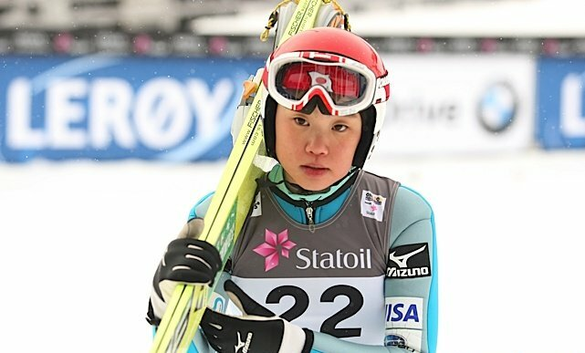 Yūki Itō podczas serii treningowej przed konkursem indywidualnym kobiet na Mistrzostwach Świata w Narciarstwie Klasycznym 2011 w Oslo.